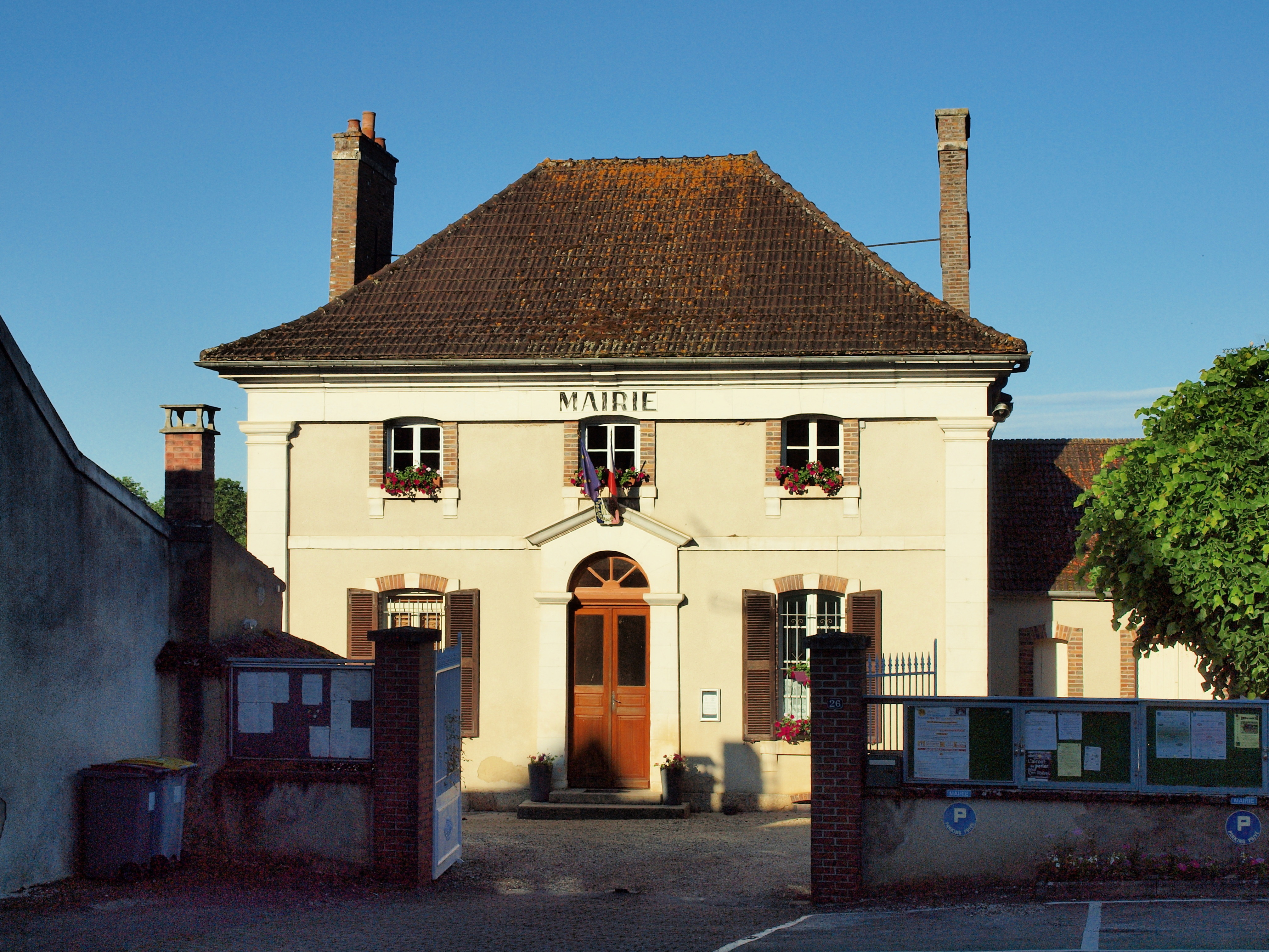 Brion (Yonne, France)